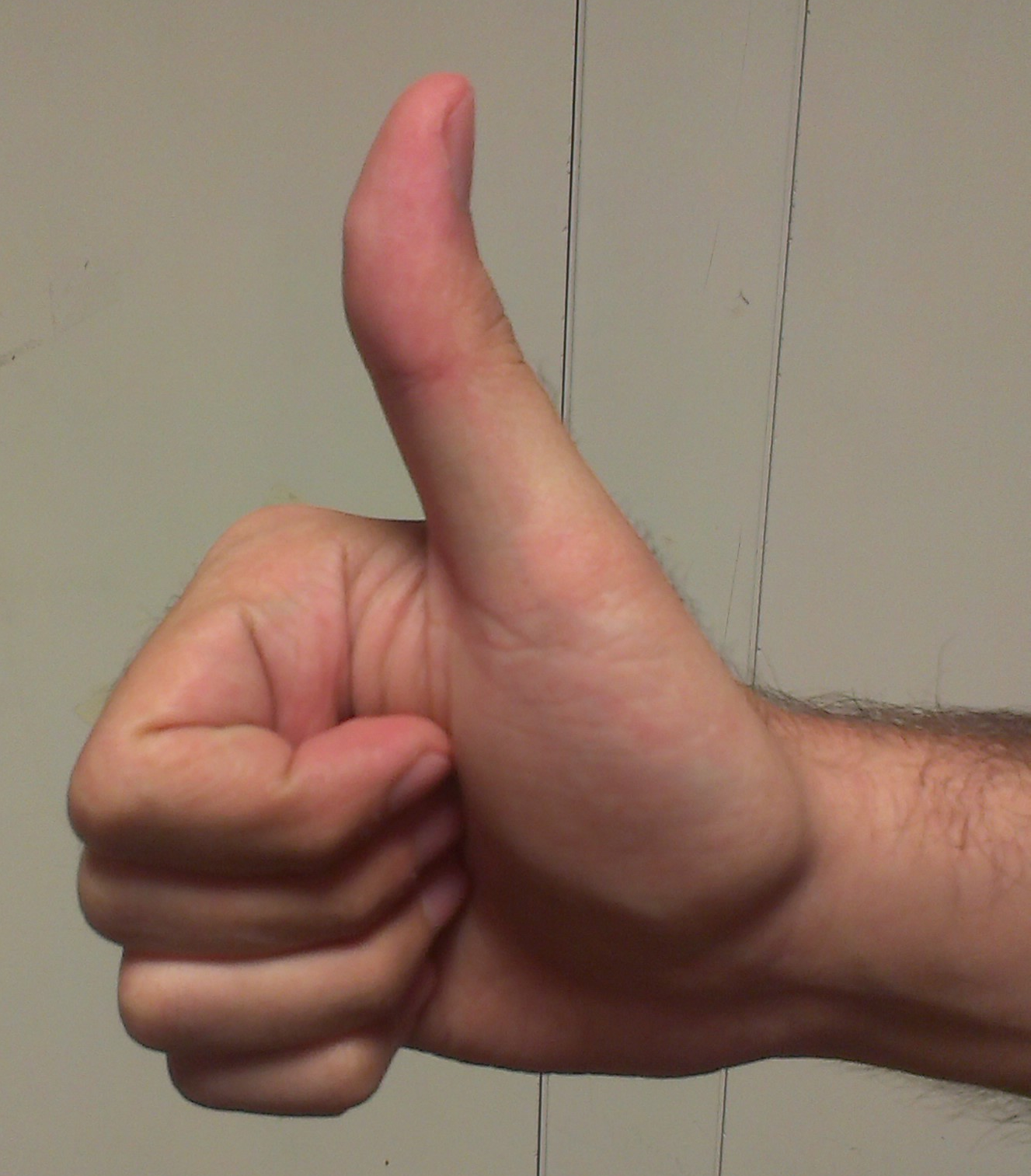 neverbalna komunikacija - geste